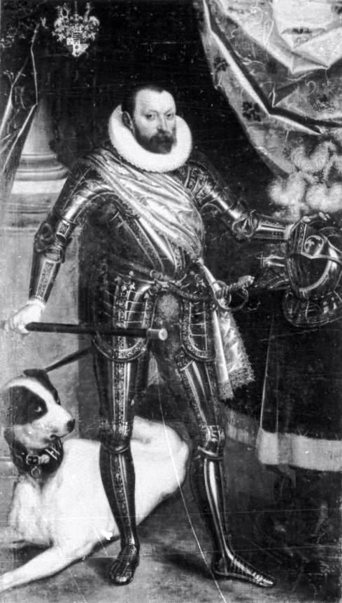 Friedrich Wilhelm I., Herzog von Sachsen-Weimar (1562-1602)